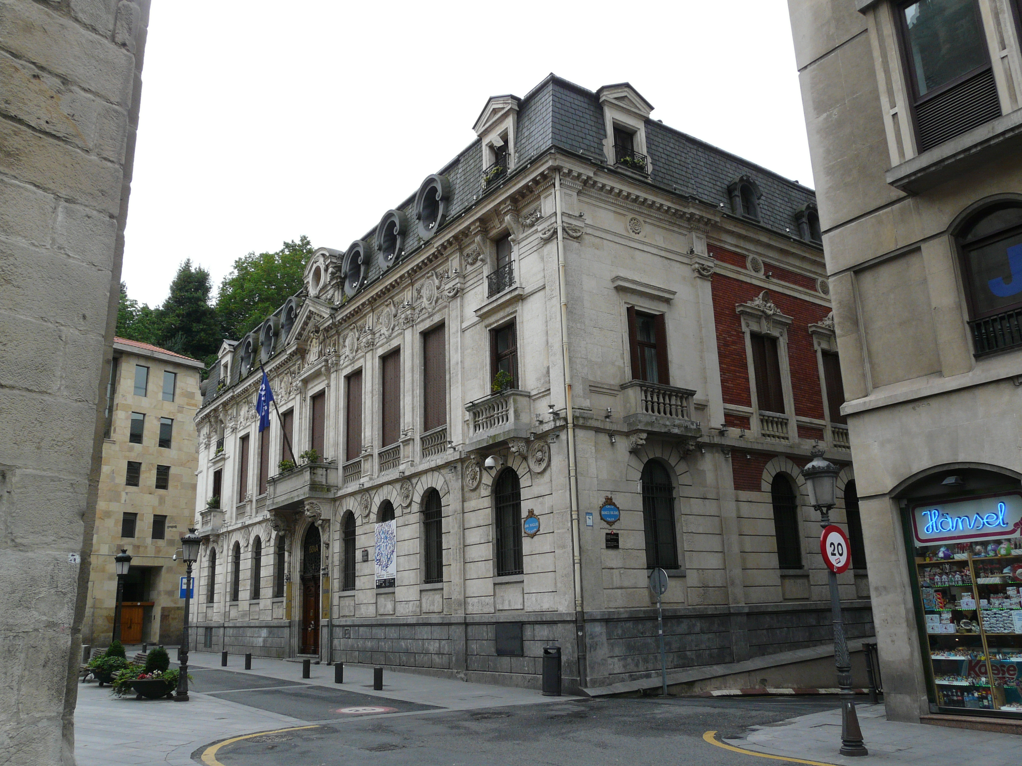 Primera seu del Banc de Bilbao, al costat de l'església de San Nikolas